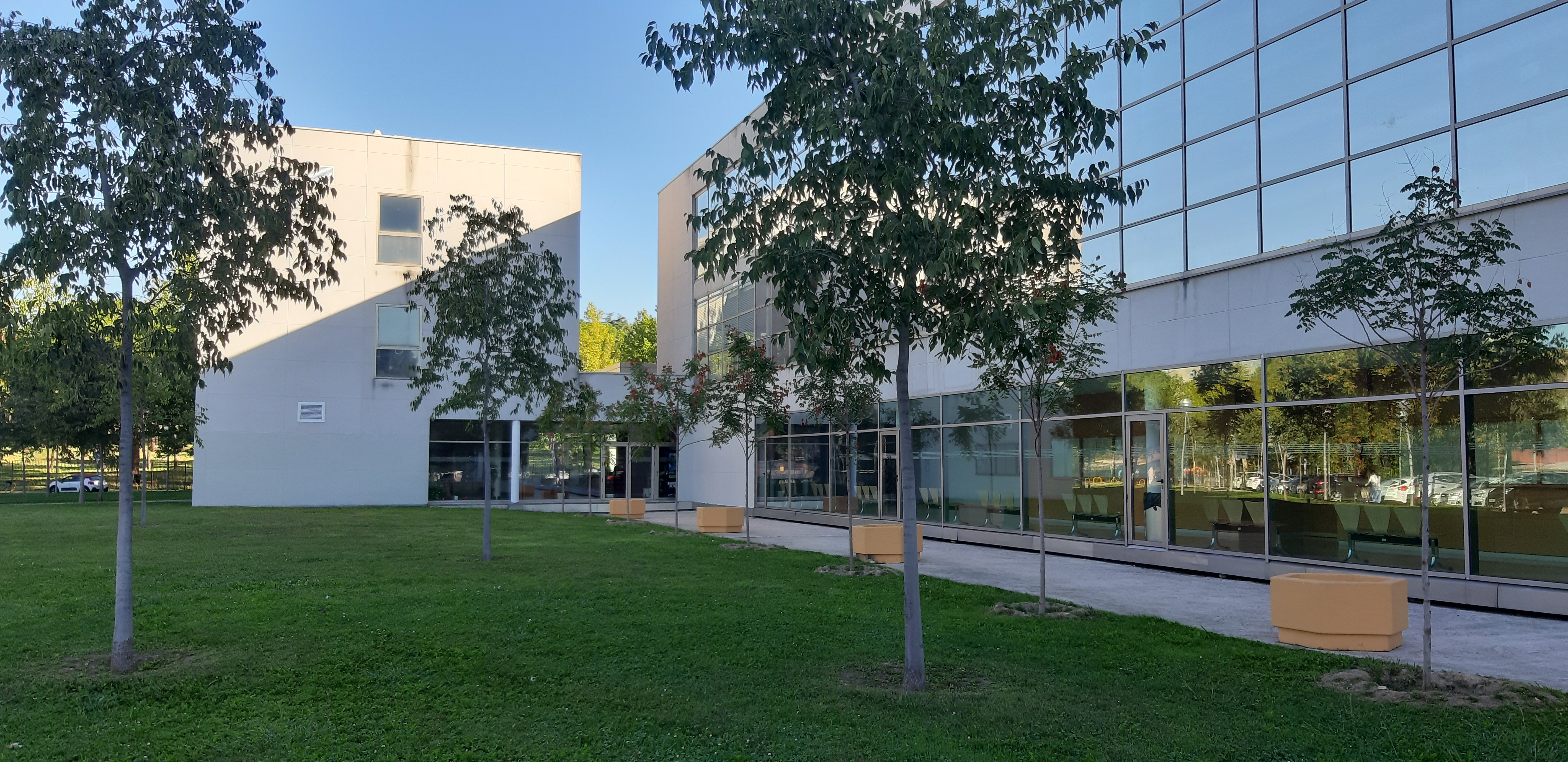 Edificio acristalado Universidad Complutense